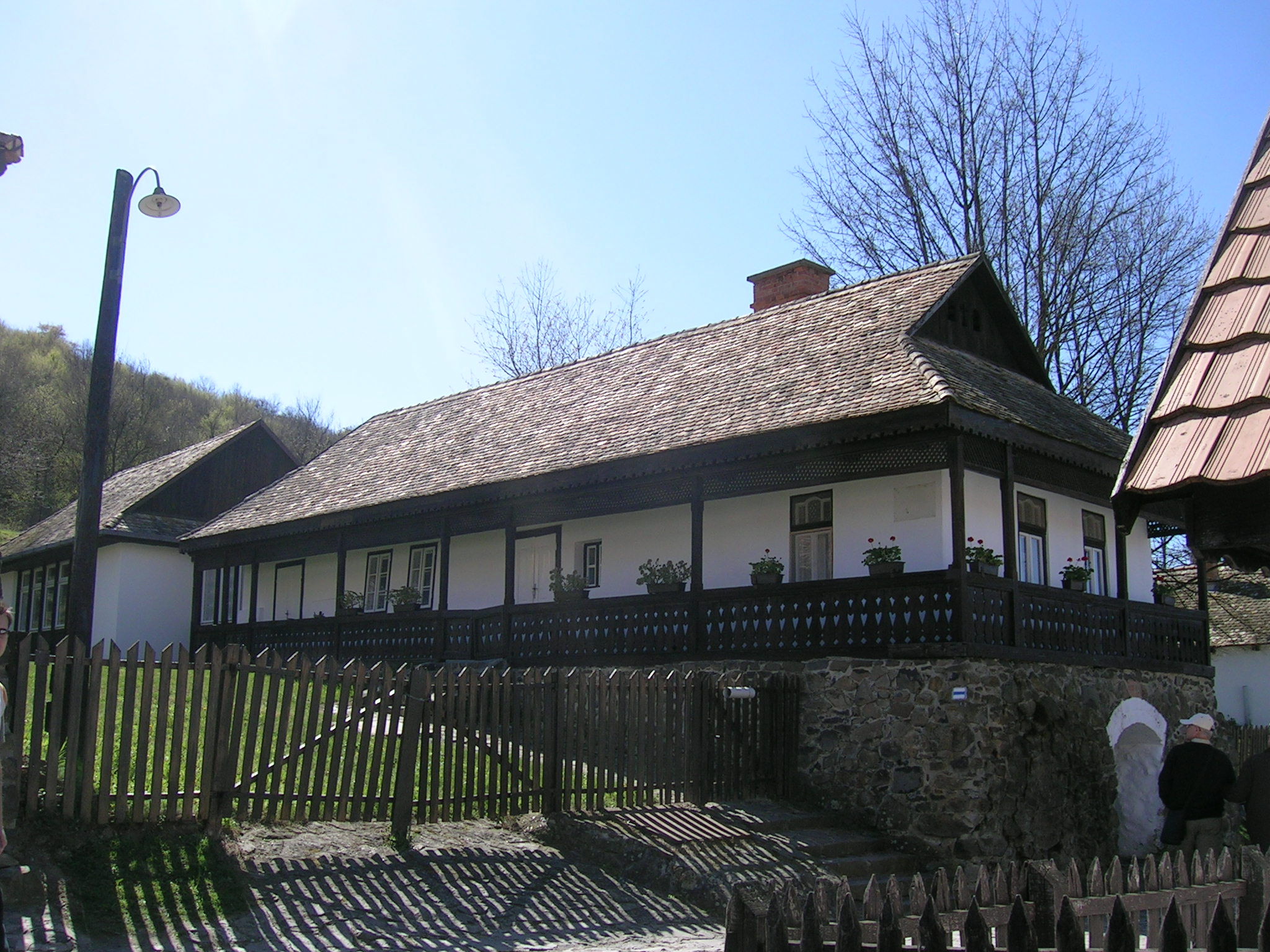 maison traditionnelle palocze à Hollókő (Honrie)